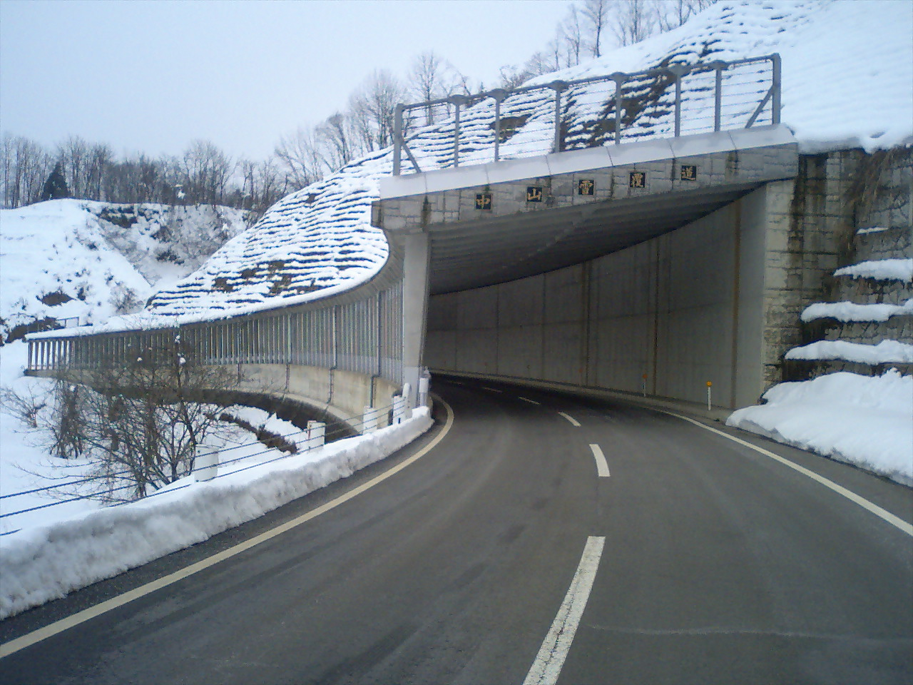 この画像は2008年1月23日投稿者によって、新潟県長岡市川口中山（新潟県道333号線車道上）にて撮影された中山雪覆道の写真。